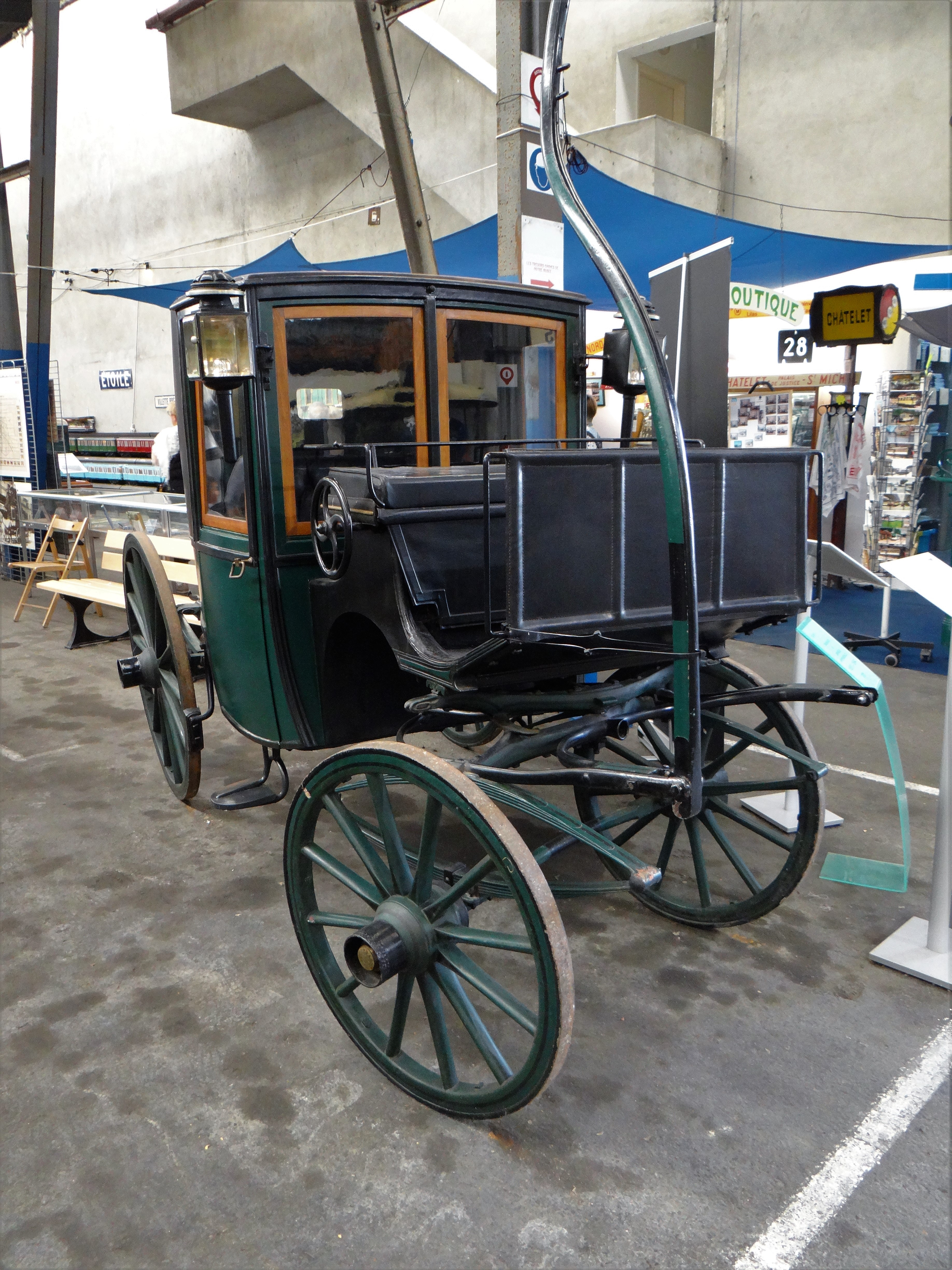 Fiacre 2 places Poitrason de 1938 à Paris (fiacre Binder). Musée des transports urbains, interurbains et ruraux, Chelles, Seine-et-Marne, France.